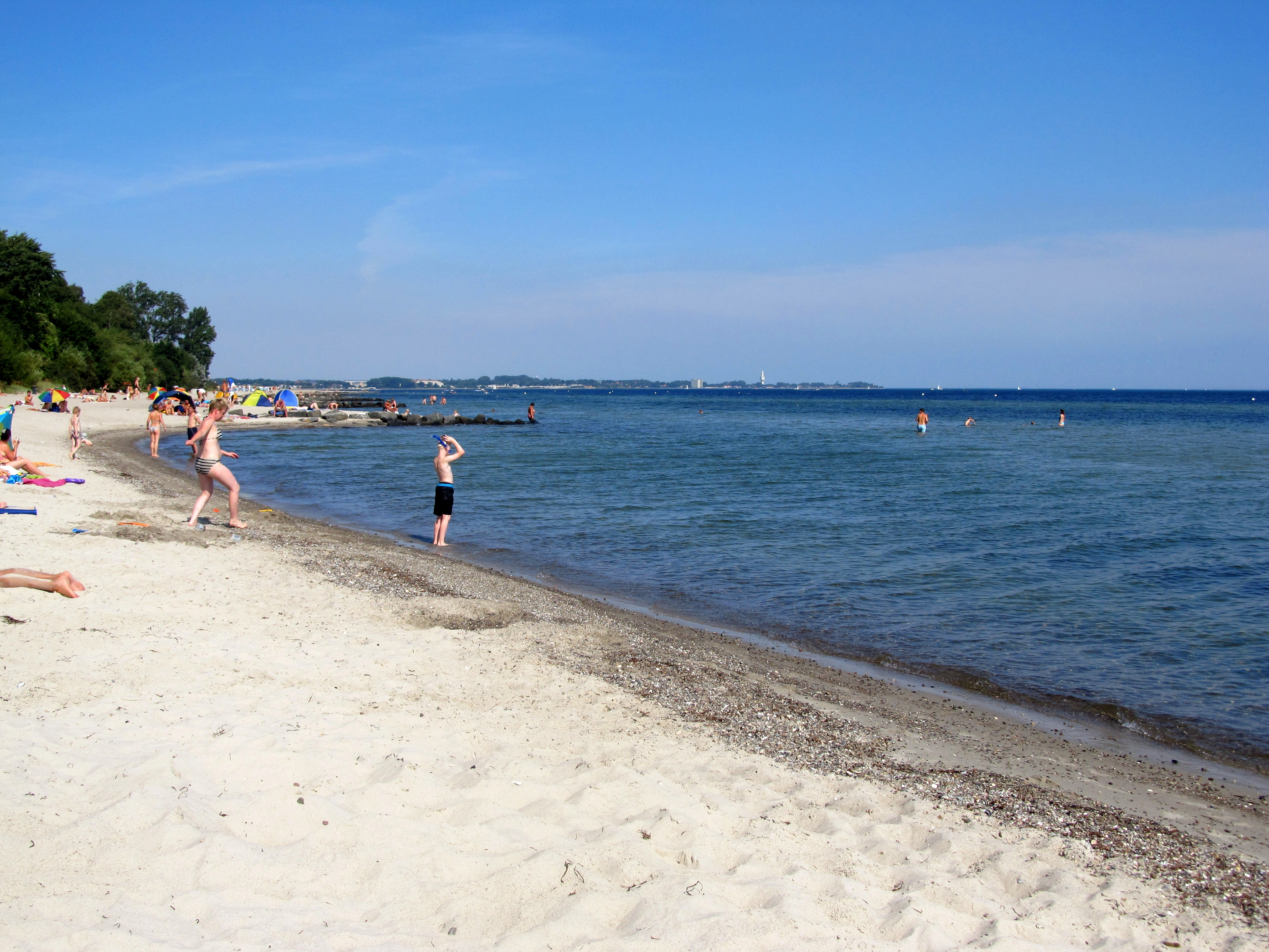 Strand von Sierksdorf im Kreis Ostholstein an der Lübecker Bucht